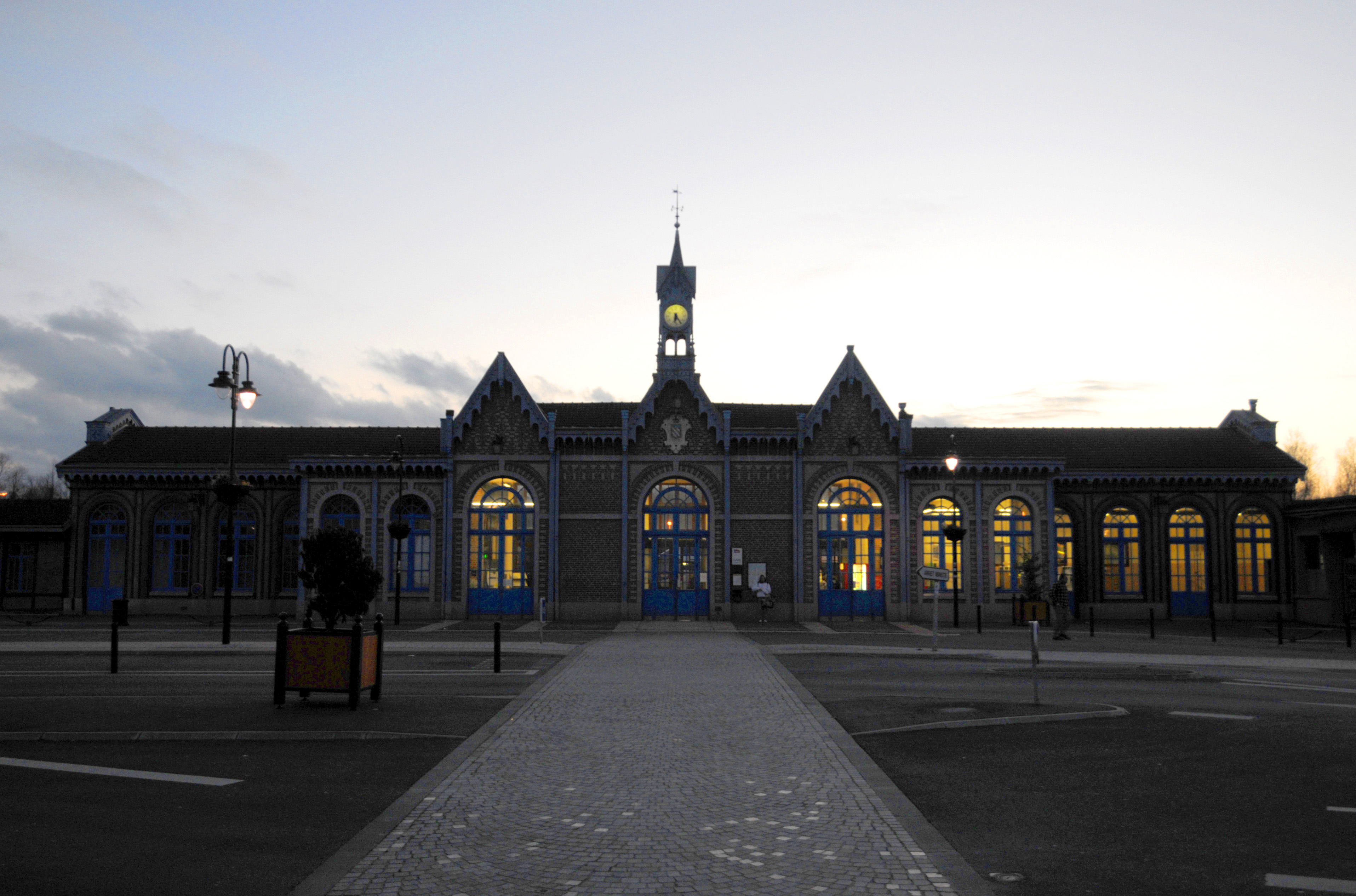 Abbeville (Somme, France) - La gare, un soir de février. . .